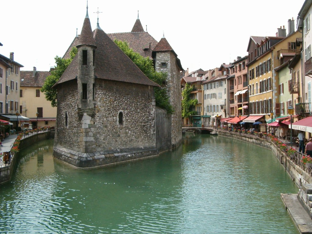 Le Palais de l'Isle à Annecy en France dans le département de la Haute-Savoie.